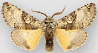 Charadra cakulha male